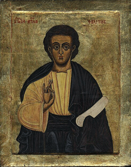 Apostle Philip